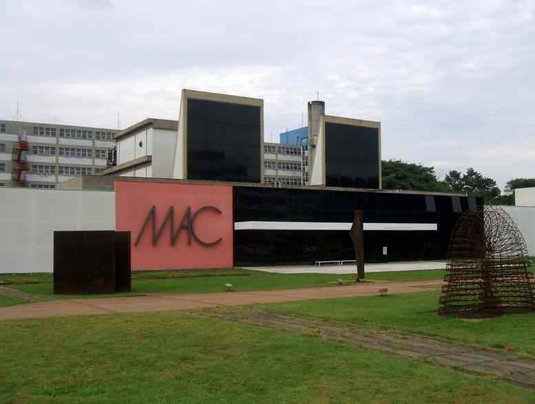 Museu de Arte Contemporânea da Universidade de São Paulo, Cidade Universitária, São Paulo, Brasil